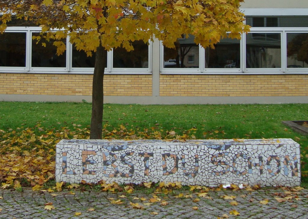 Innenhof